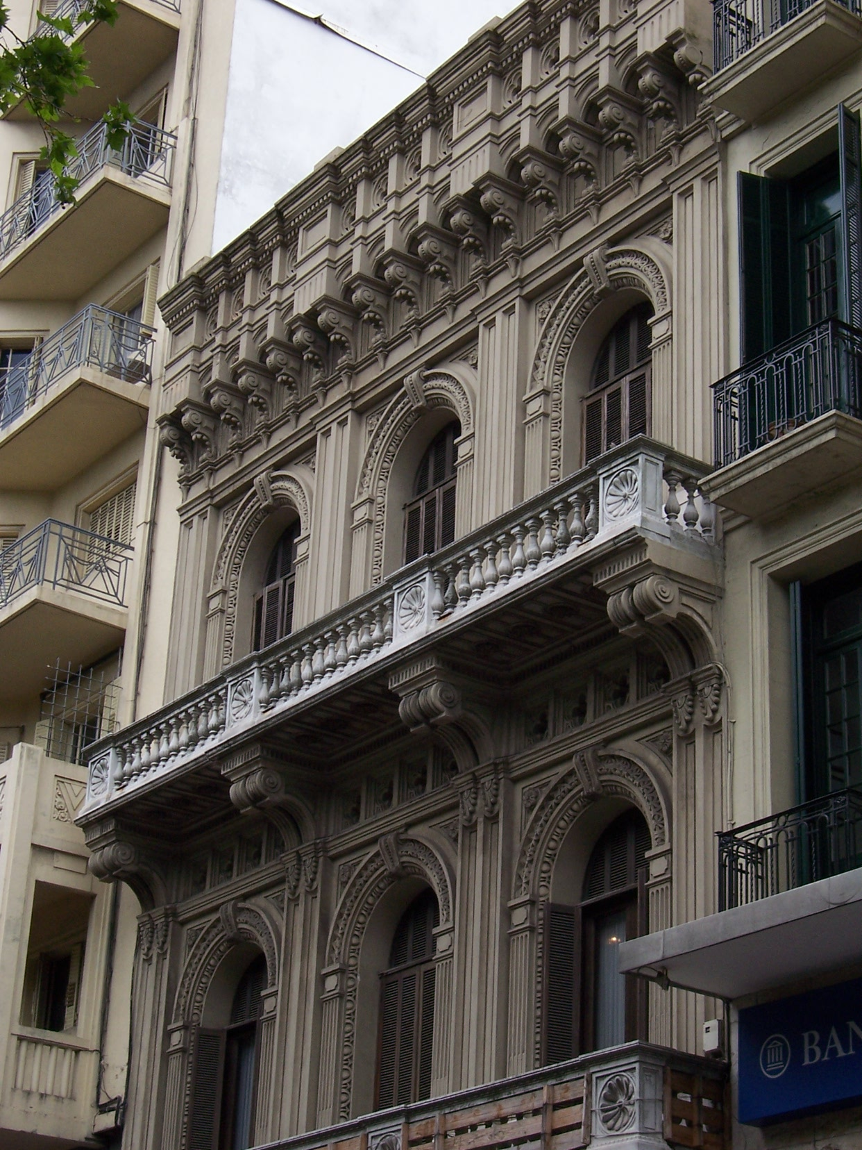 Casa de la Flia. Vaeza - Sede del Partido Nacional. Ubicada en el departamento de Montevideo